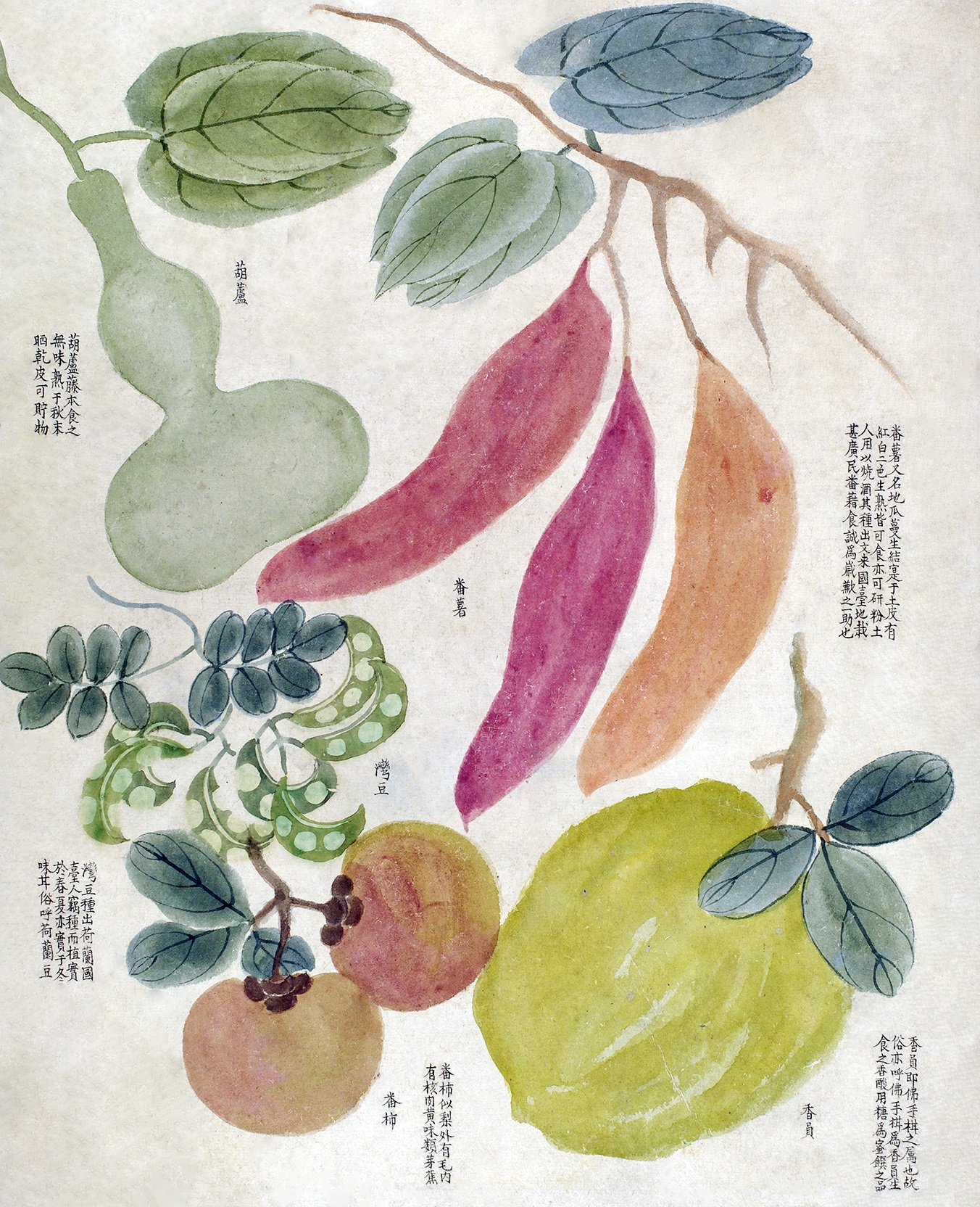 《臺海采風圖》：番薯、香員、番柿、葫蘆、灣豆